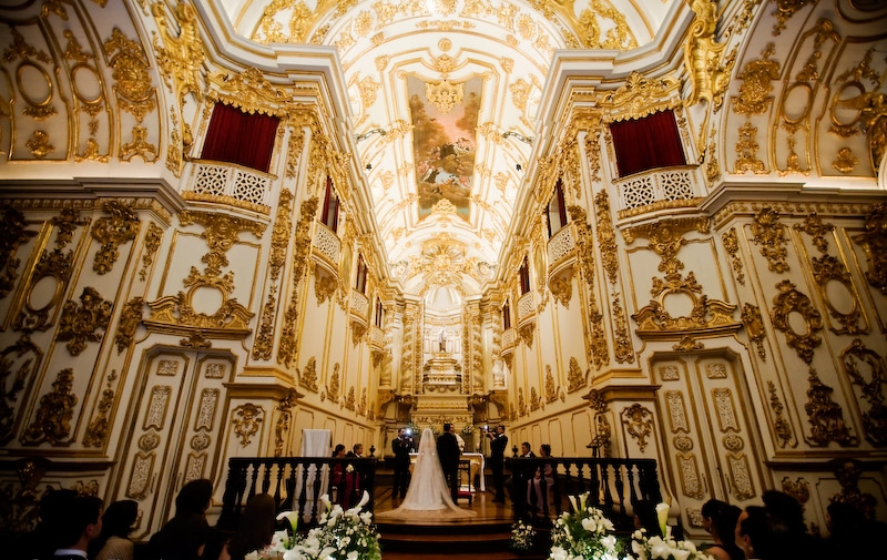 Interior of Igreja de Nossa Senhora do Monte do Carmo, Rio de Janeiro